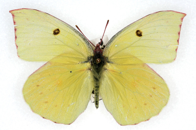 Zerene eurydice female